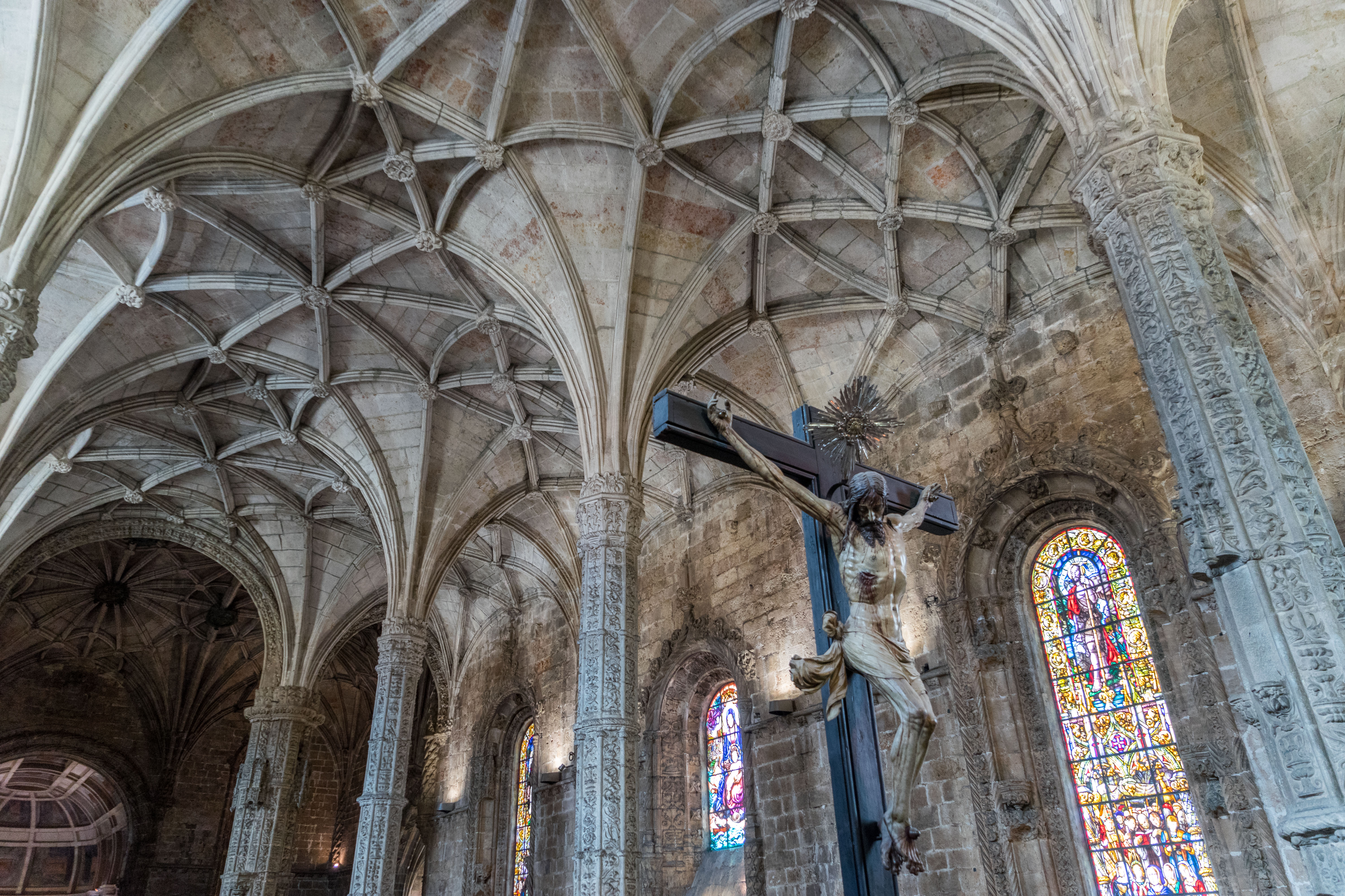 Plafond de l'église du monastère des Hyéronimites